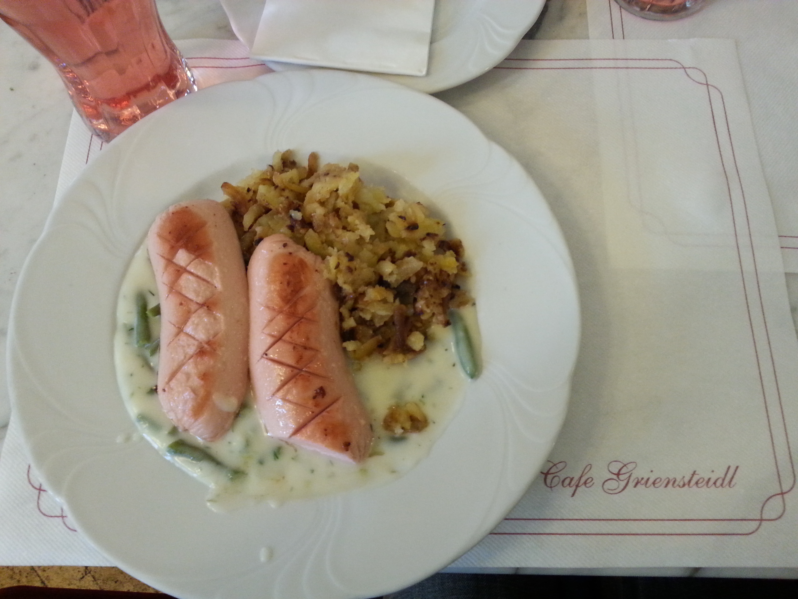 'Augsburger' im Wiener Café Griensteidl